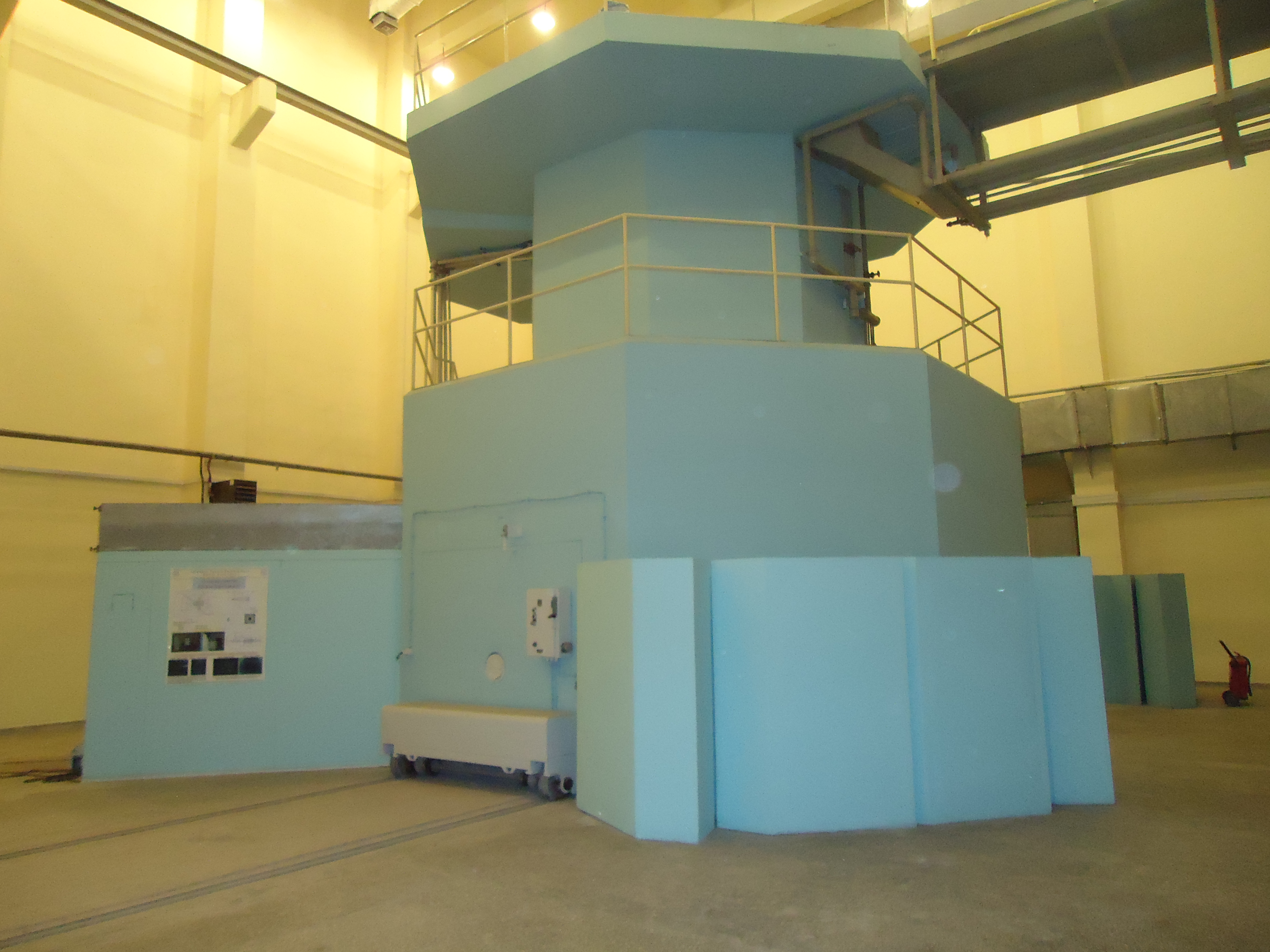 İTÜ Enerji Mühendisliği bölümünde yer alan Triga Mark-II tipi deney amaçlı kullanılan nükleer reaktör